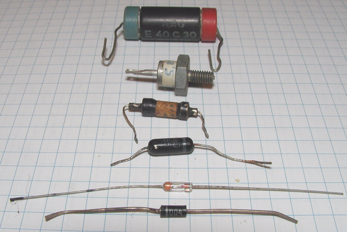 Weitere, auch ältere Bauformen von (Gleichrichter-)Dioden